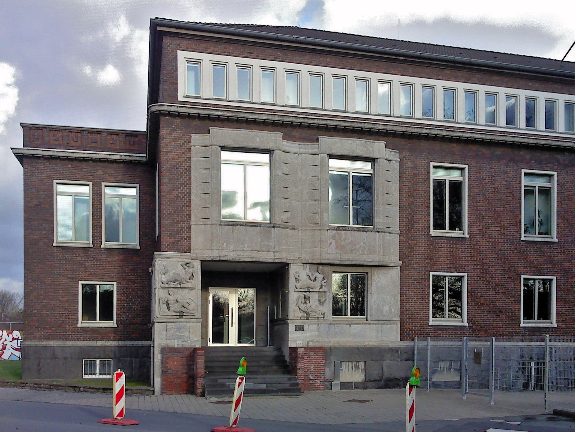 Verwaltungsgebäude der ehem. Zeche Amalie in Essen-Altendorf, Teile des Eingangs stammen vom Architekten Edmund Körner